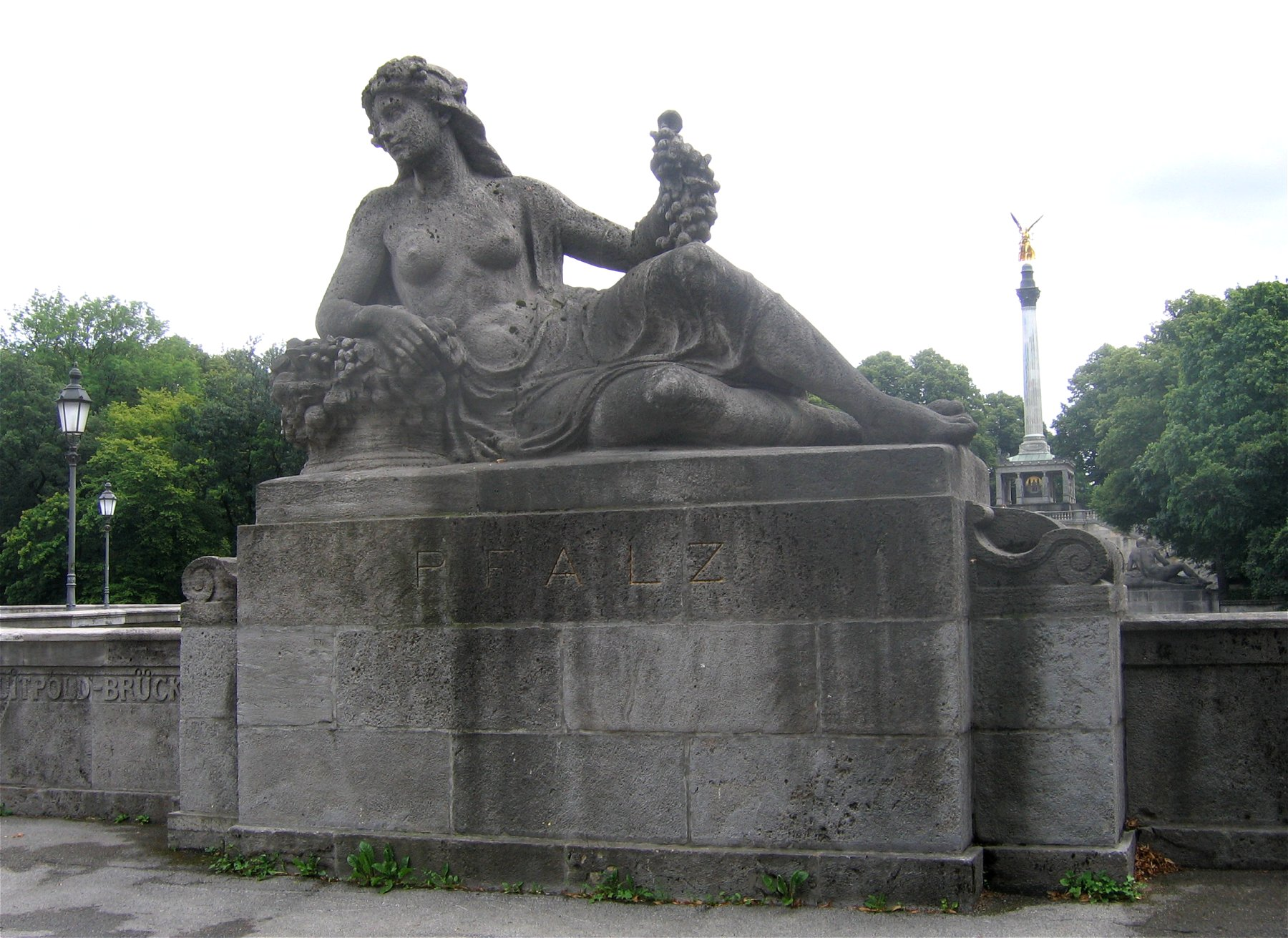 Skulptur "Pfalz" an der Luitpoldbrücke, München